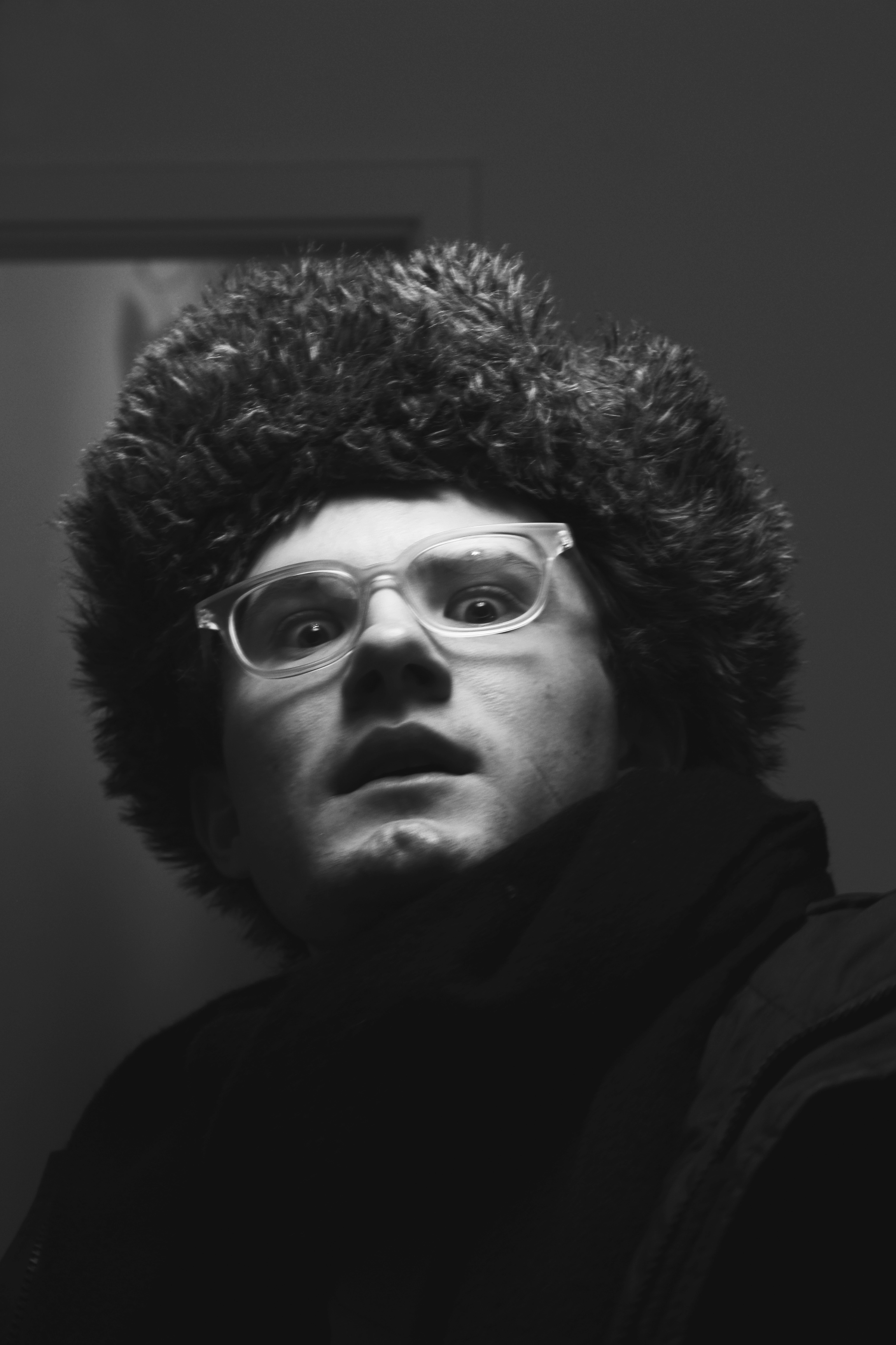 Valentin Richter als "Pate" (2018)